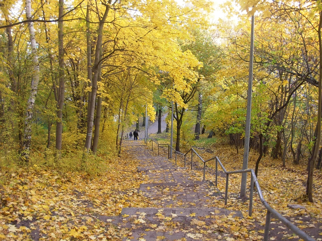 Park na Wzgórzu Wolności w Bydgoszczy